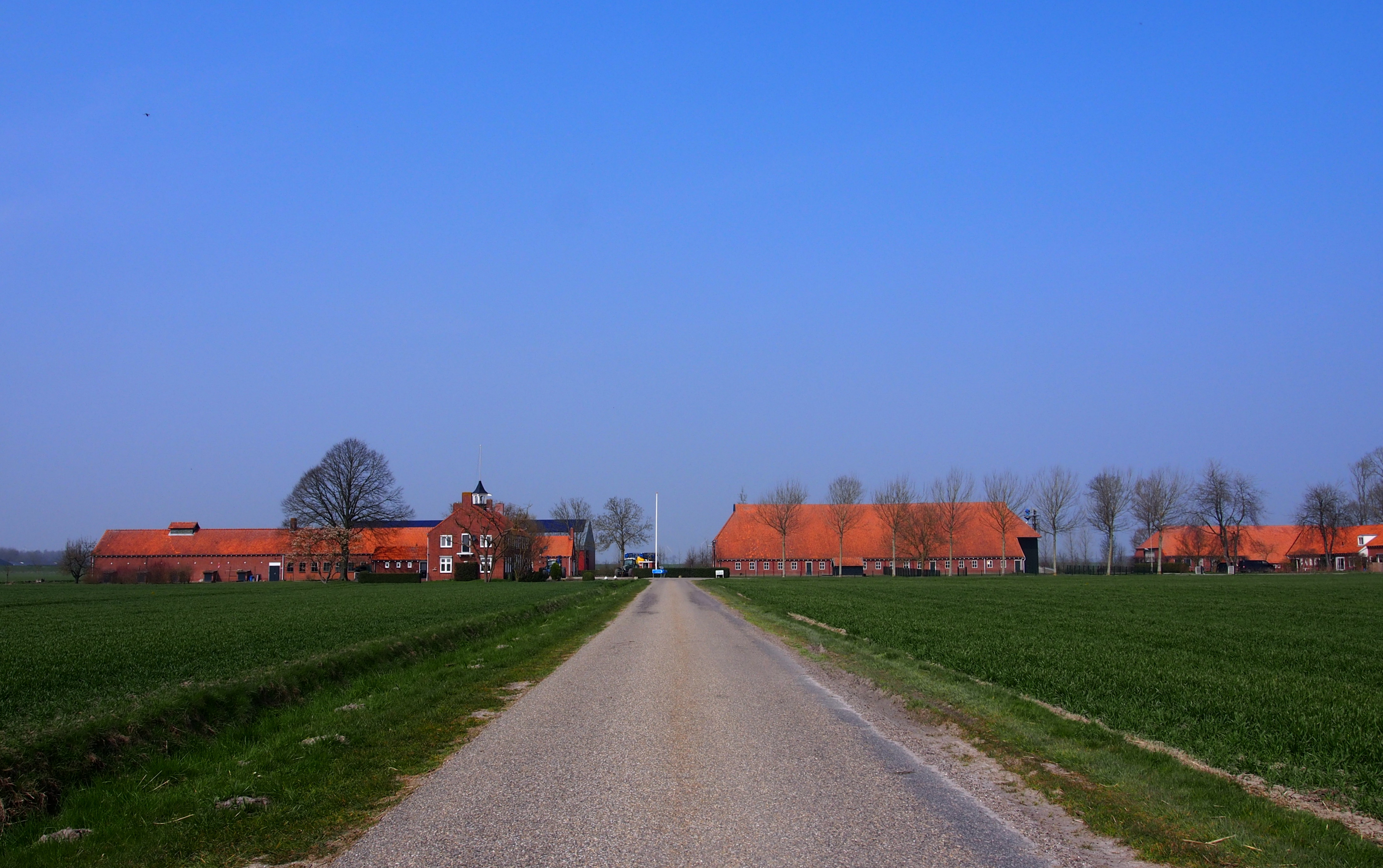 Gebouwencomplex en modelboerderij Johannes Kerkhovenpolder